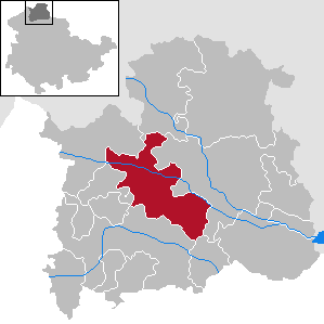 Gemeinde Werther in Thüringen, Landkreis Nordhausen